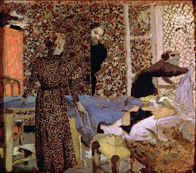 Interieur a la Table à Ouvrage